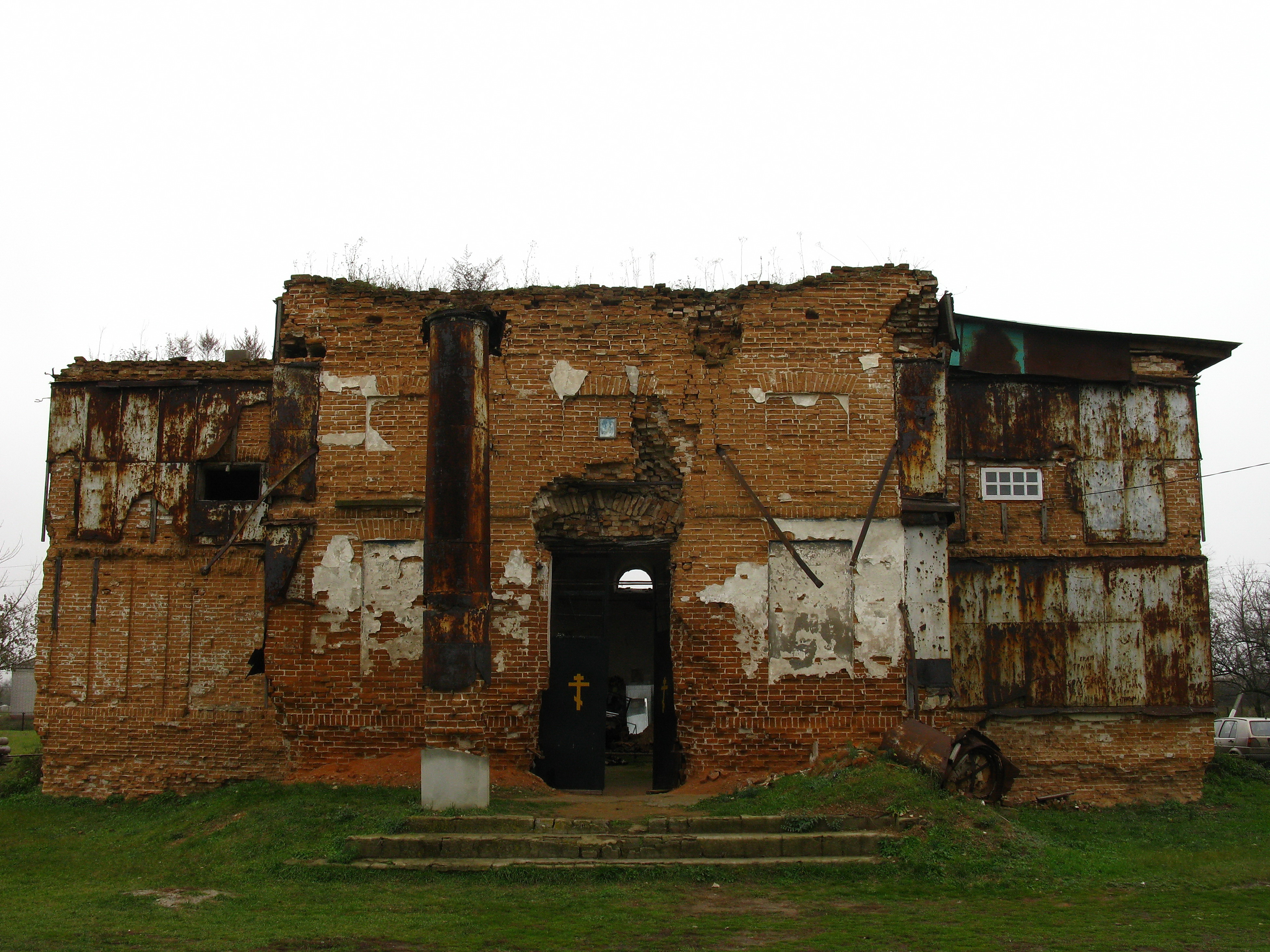 Церква Різдва Богородиц (мур.)і, смт.Петриківка